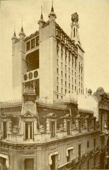 La Galería Güemes inaugurada el 15 de diciembre de 1915, poco después de esa fecha.